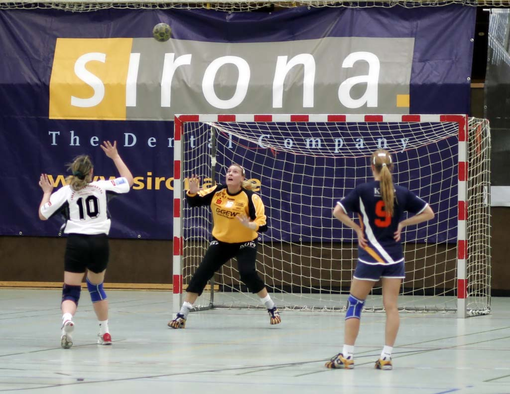 Ein Heber (Loup) als Siebenmeterwurf. Aufgenommen im Bundesligaspiel HSG Bensheim/Auerbach - TSG Ober-Eschbach. Im Tor Eva Giron-Timmler.